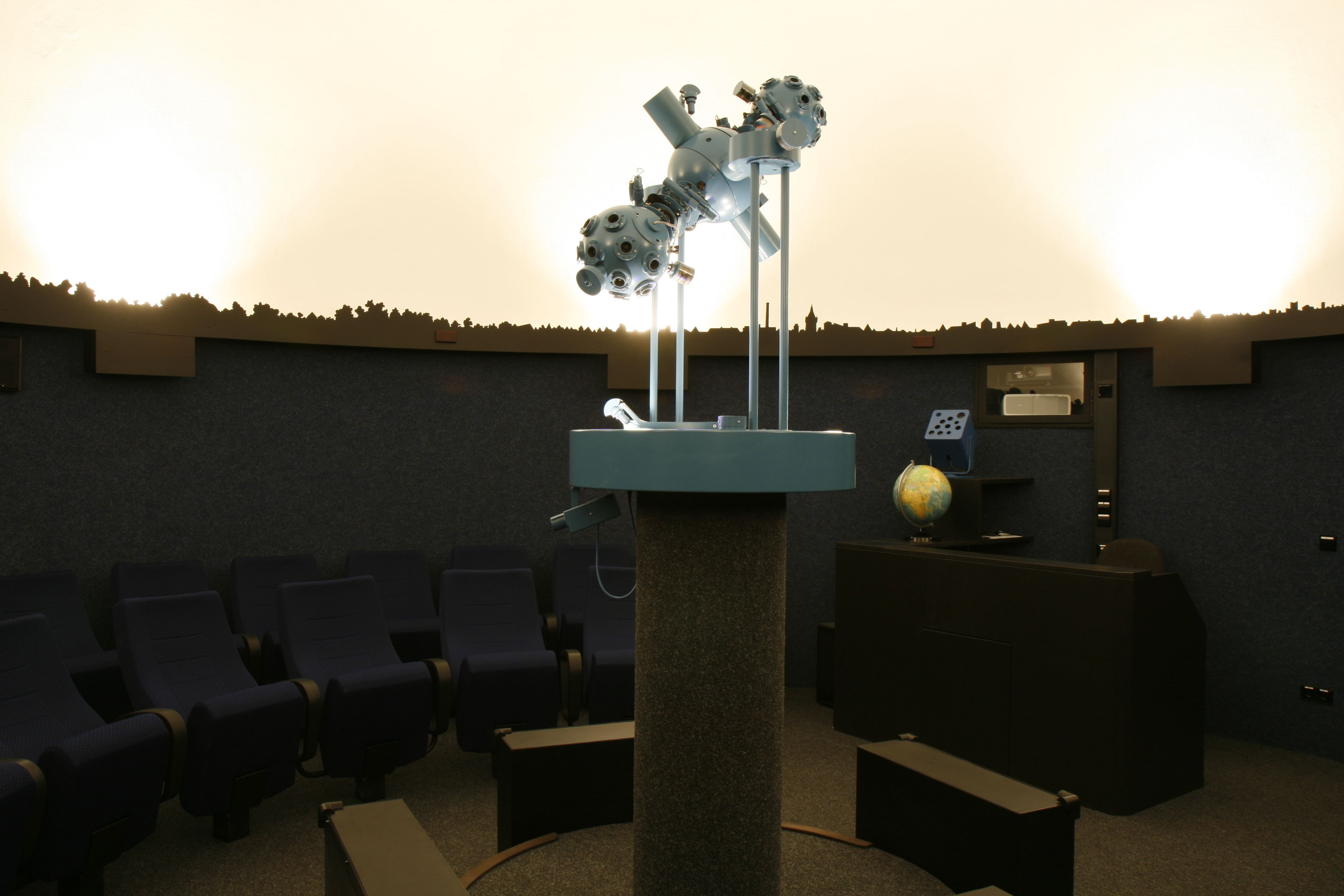 Astronomische Station "Samuel Heinrich Schwabe"